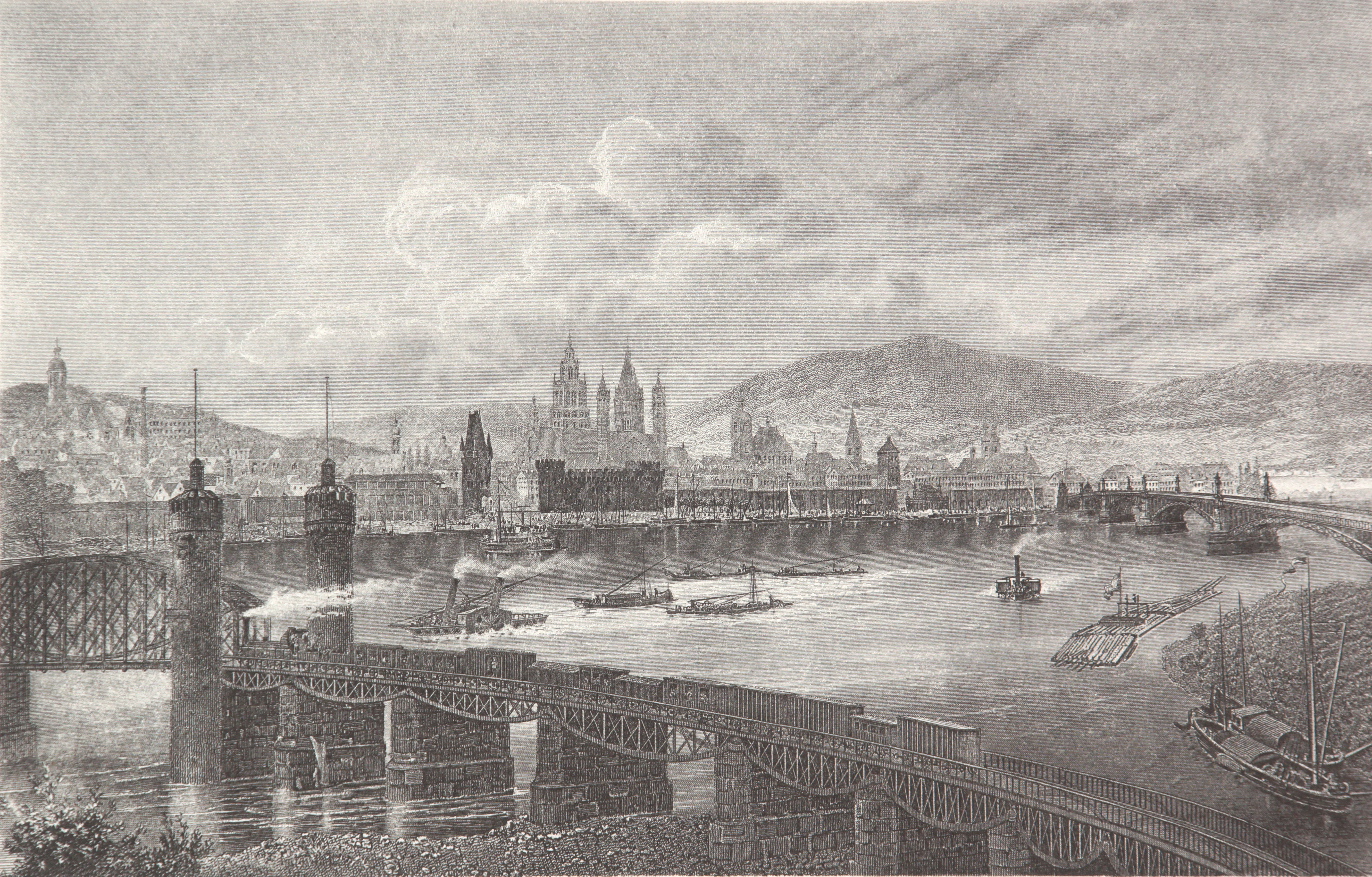 Mainz, Stahlstich aus einem Rheinalbum von Friedrich Foltz, Bildgröße 22,5 x 15 cm